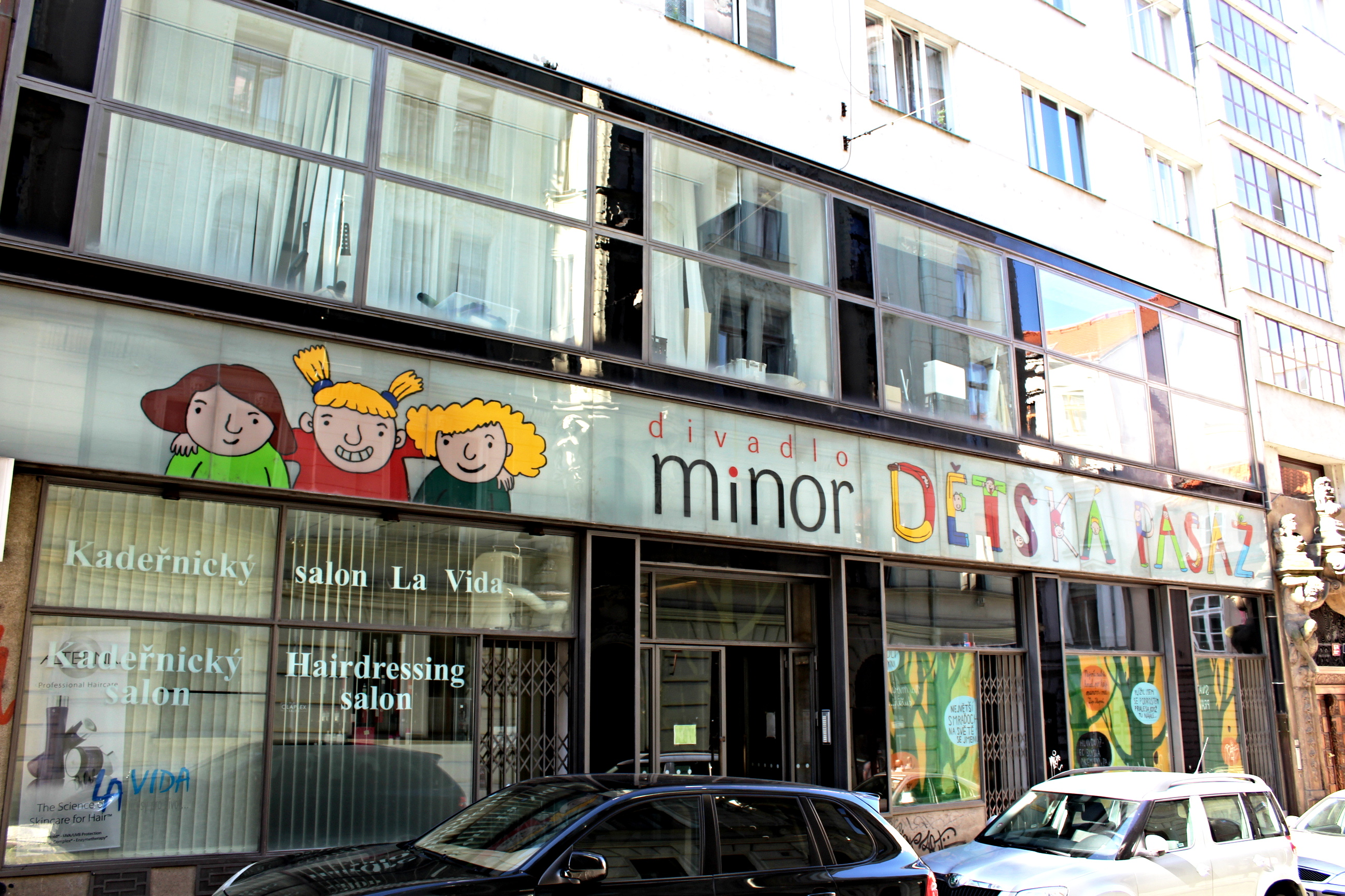 Divadlo Minor